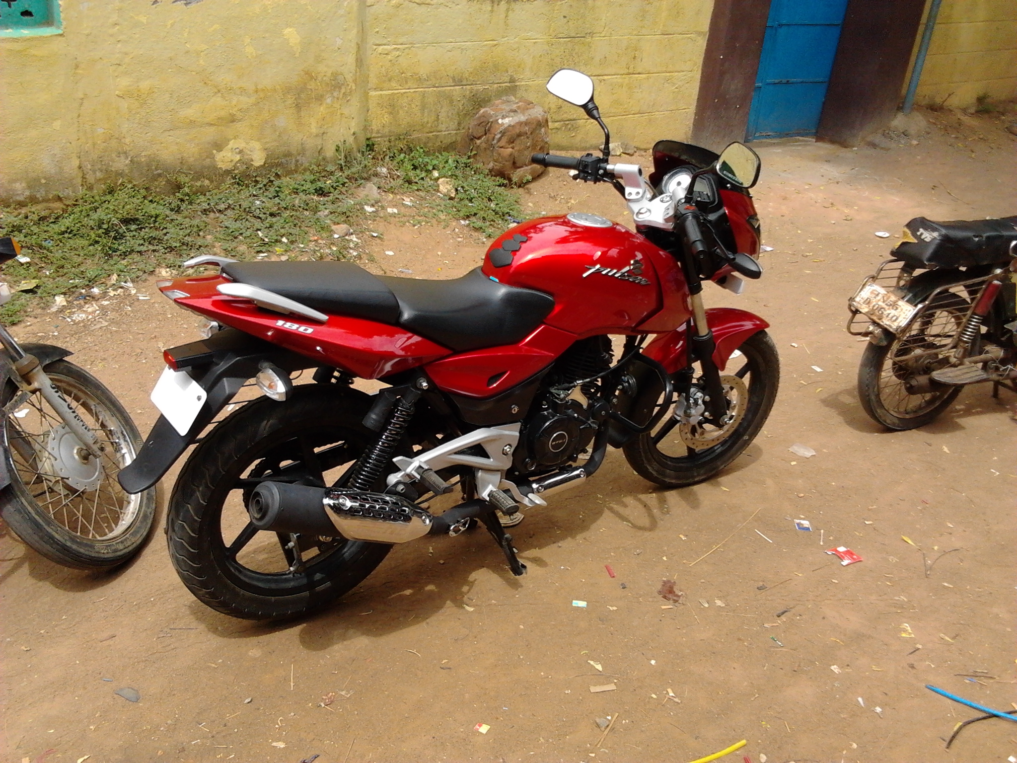 இந்த படம் என்னுடைய சொந்த வாகனத்தின் புகைப்படம்.மாடல் வருடம் 2011(180சிசி)மற்றும் மெரூன் வண்ணம் கொண்ட மைபல்சர் நிழலாக உருவாக்கப்பட்ட இடம் வடகாடு,புதுக்கோட்டை மாவட்டம்.